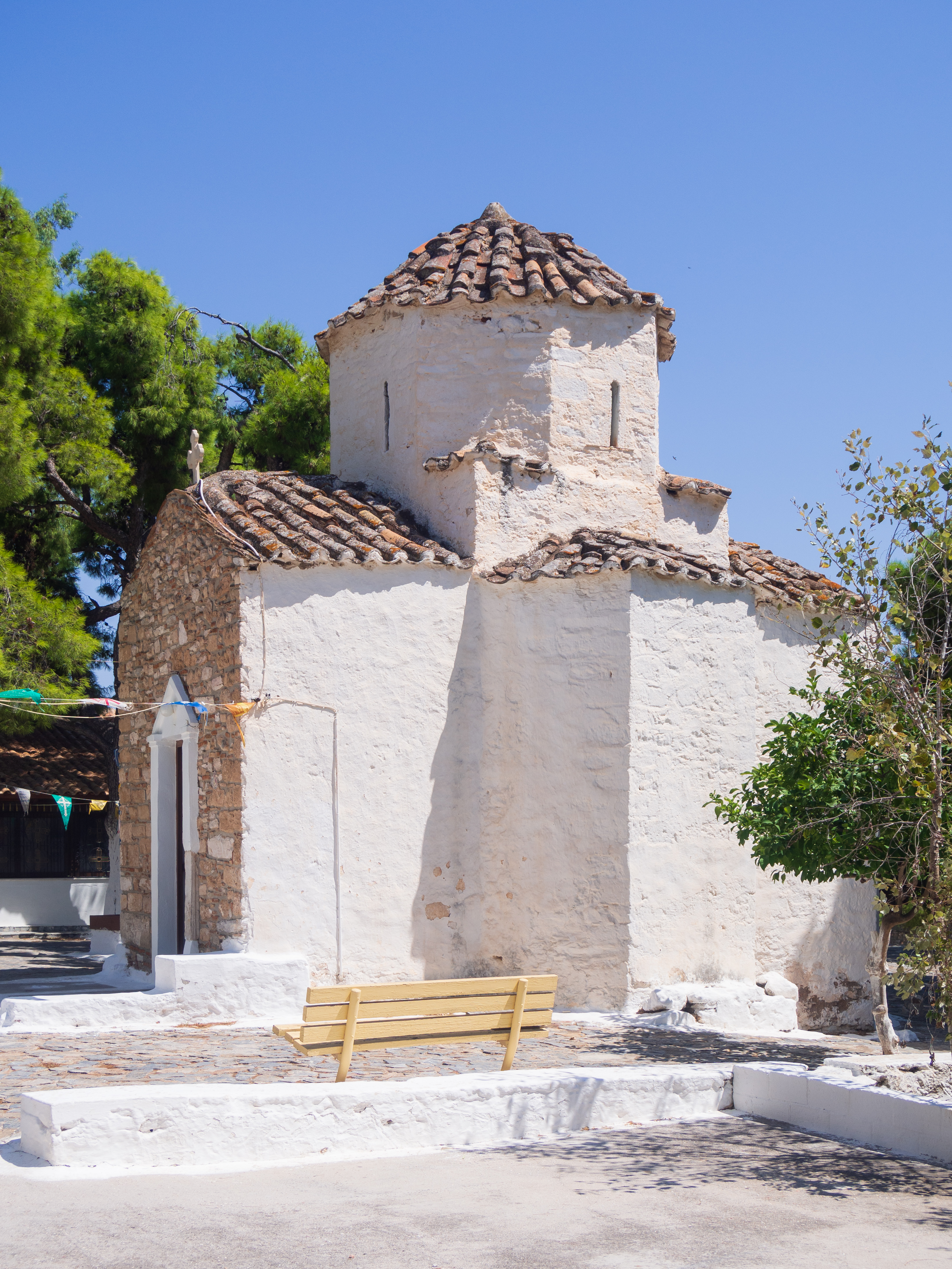 Ναός Αγίου Δημητρίου Σαρωνικού, άποψη από ΝΔ«Ναός Αγίου Δημητρίου Σαρωνικού»